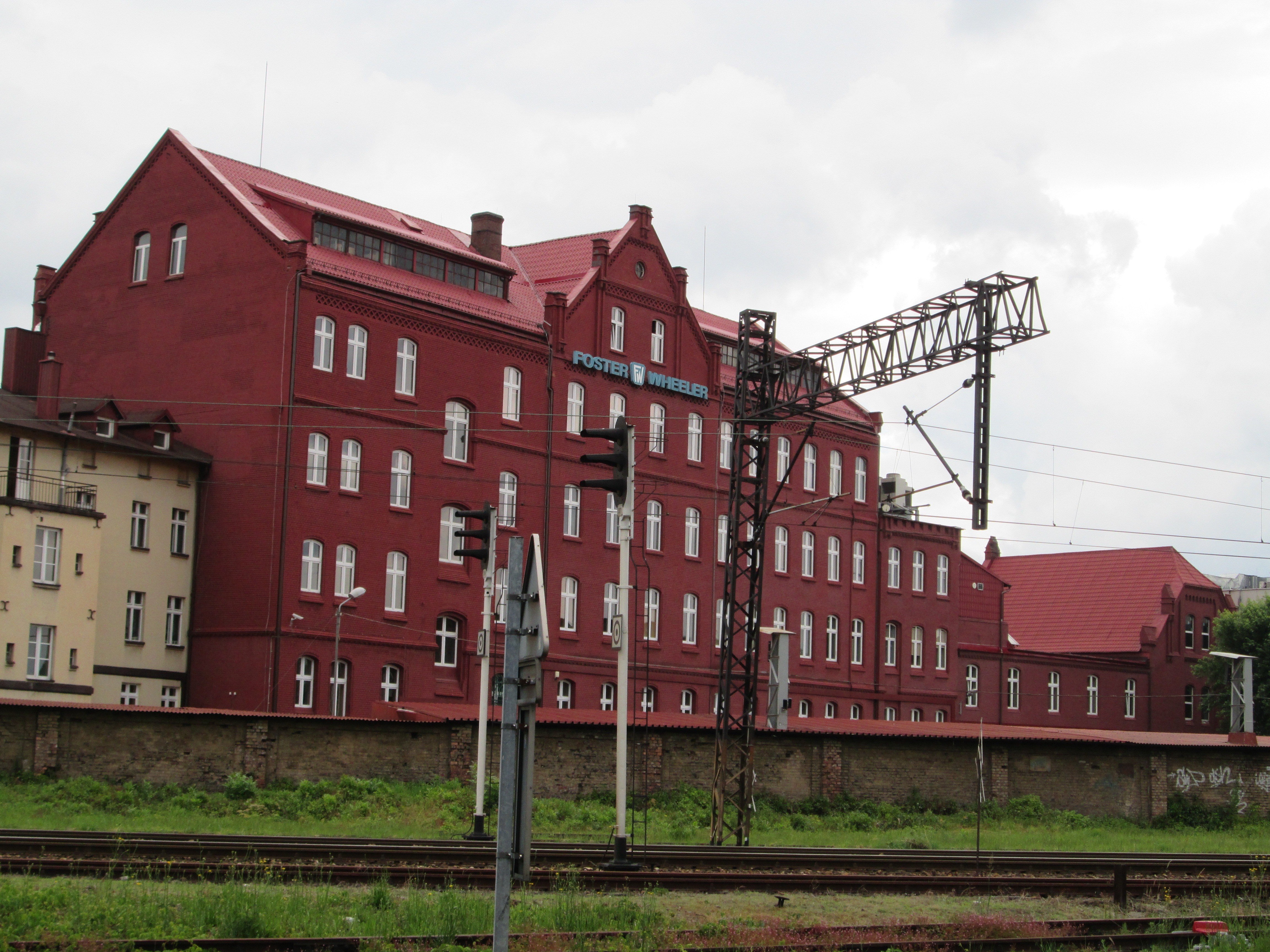 Siedziba Foster Wheeler w Sosnowcu